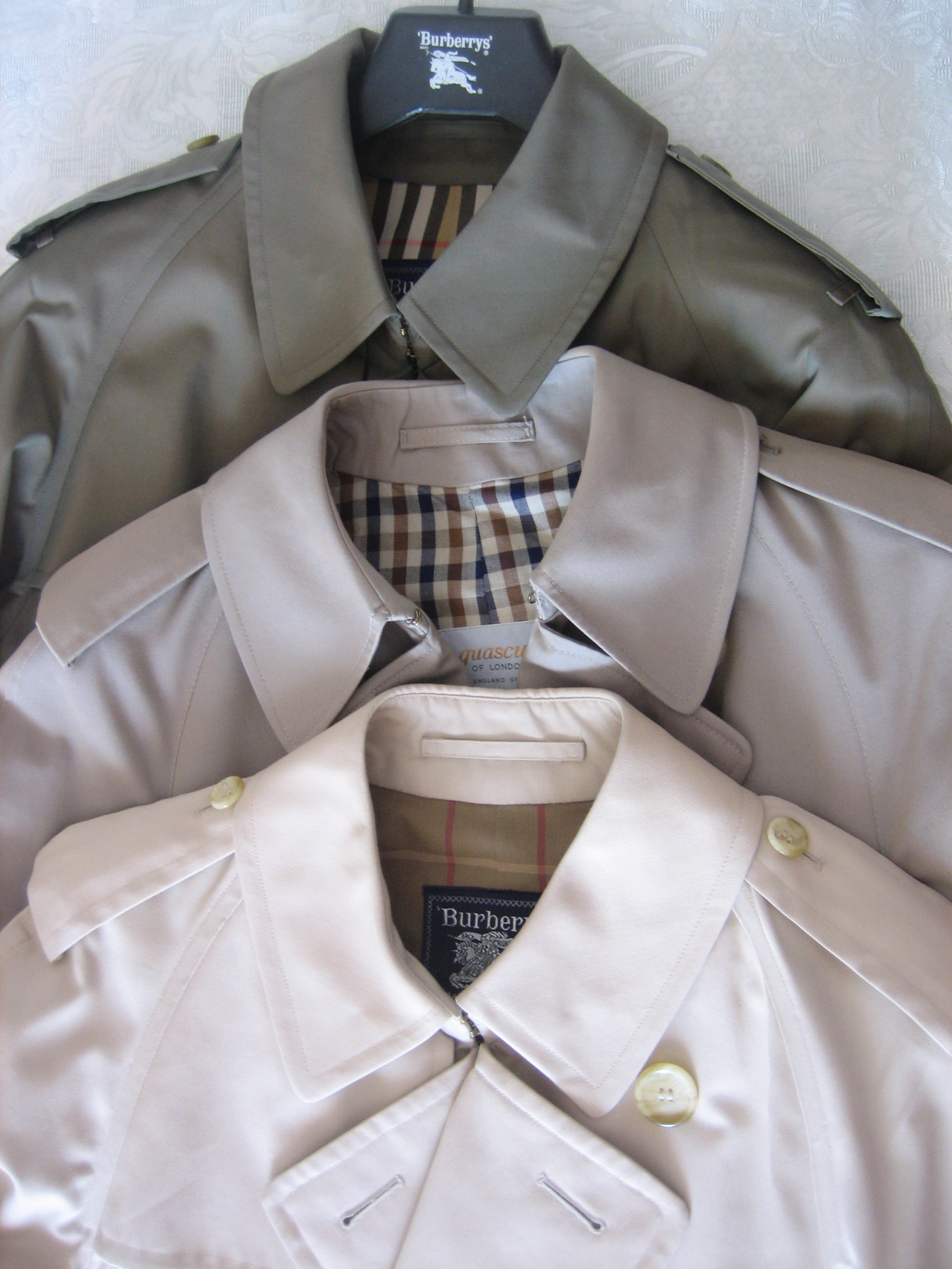 Trench, si notano le spalline, i gancetti del colletto e le fodere a quadri